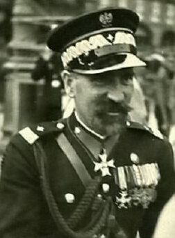 Generał dywizji Wojska Polskiego Józef Kordian Zamorski, Komendant Główny Policji Państwowej.